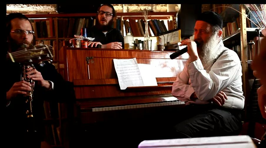 שולי רנד, חיליק פראנק ואברום בורשטיין במרתף הכליזמרים בירושלים